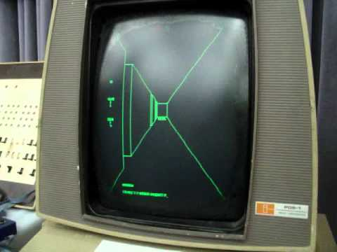 Image tiré de la démo du jeu Maze War sur Imlac (2004) tiré de la vidéo d'une vidéo de Bruce Damer sur